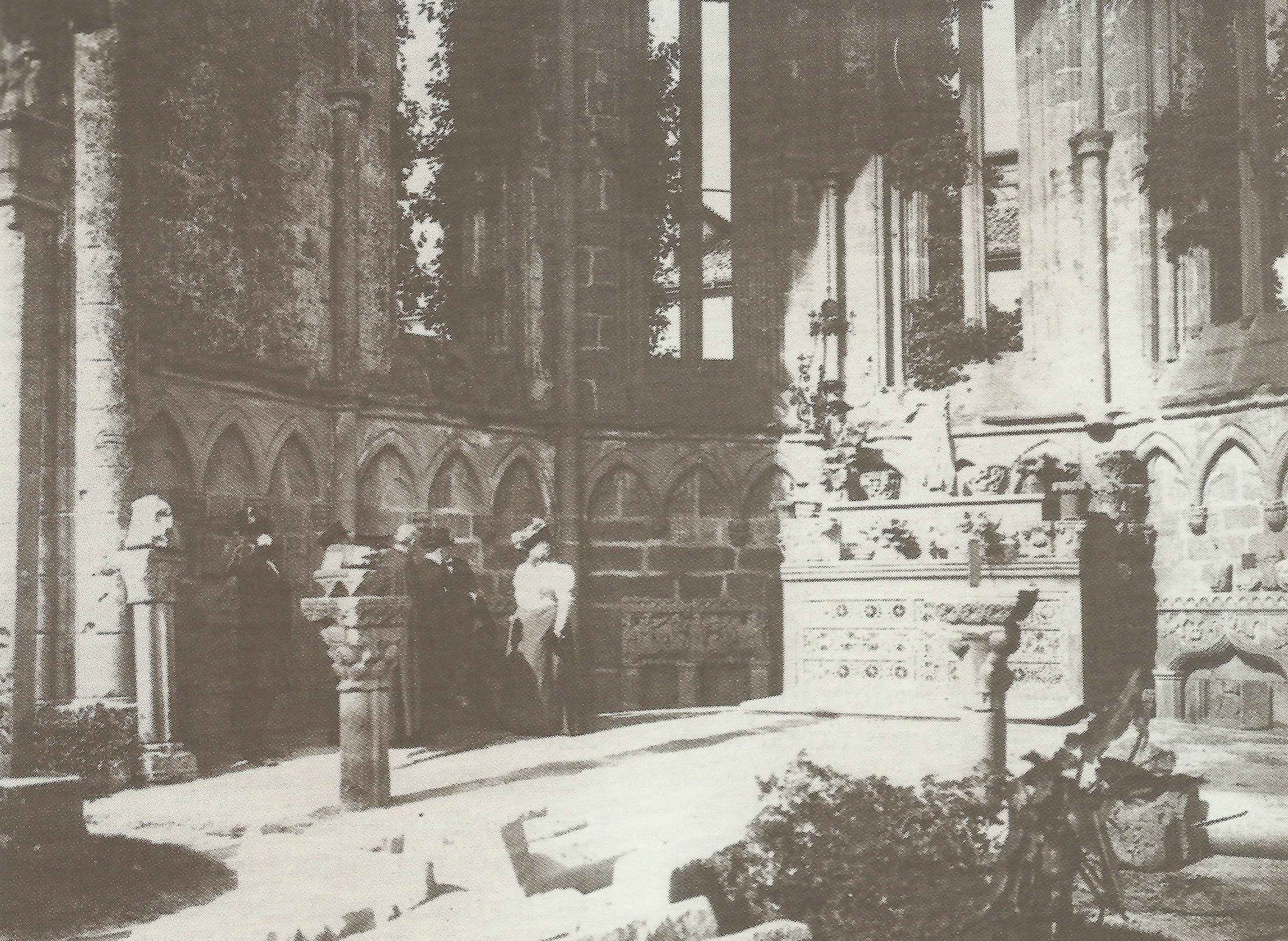 Momento da visita da Infanta Isabel de Borbón, "La Chata", ás ruínas de San Domingos, Pontevedra, en 1906. A fotografía é obra de Francisco Zagala (1842-1908)